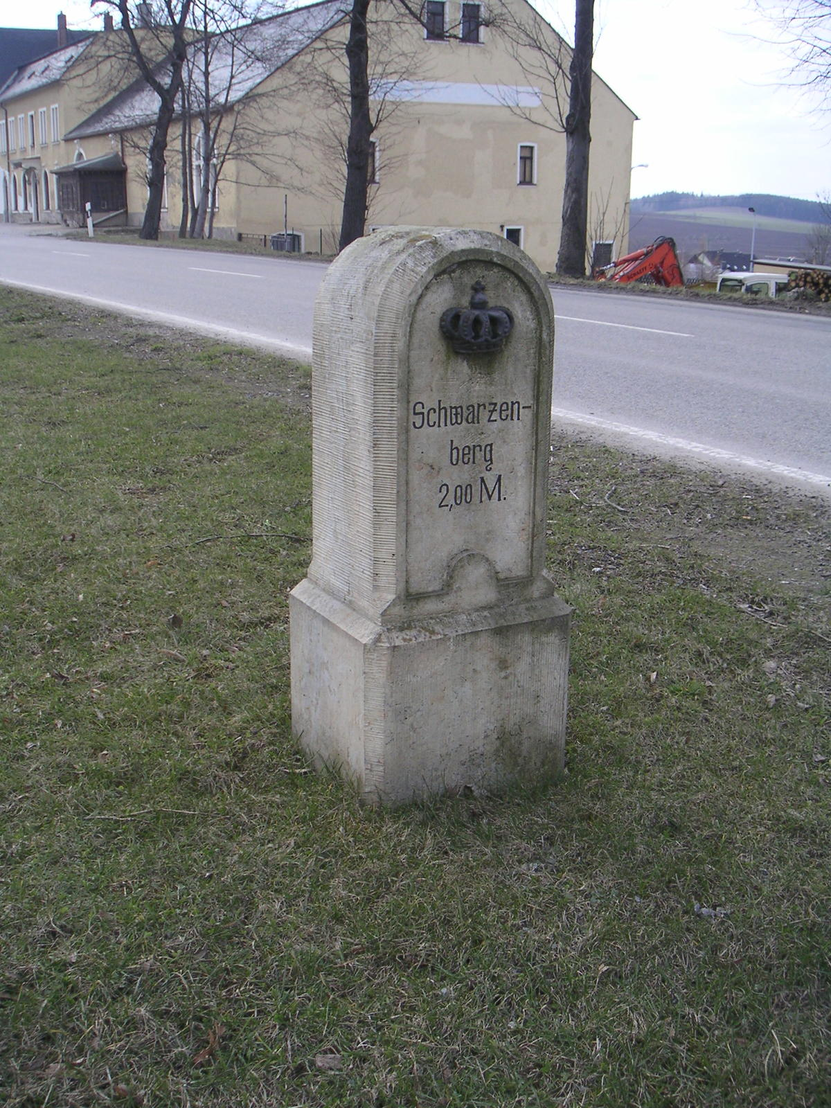 kgl-sächsischer Postmeilenstein in Scheibenberg